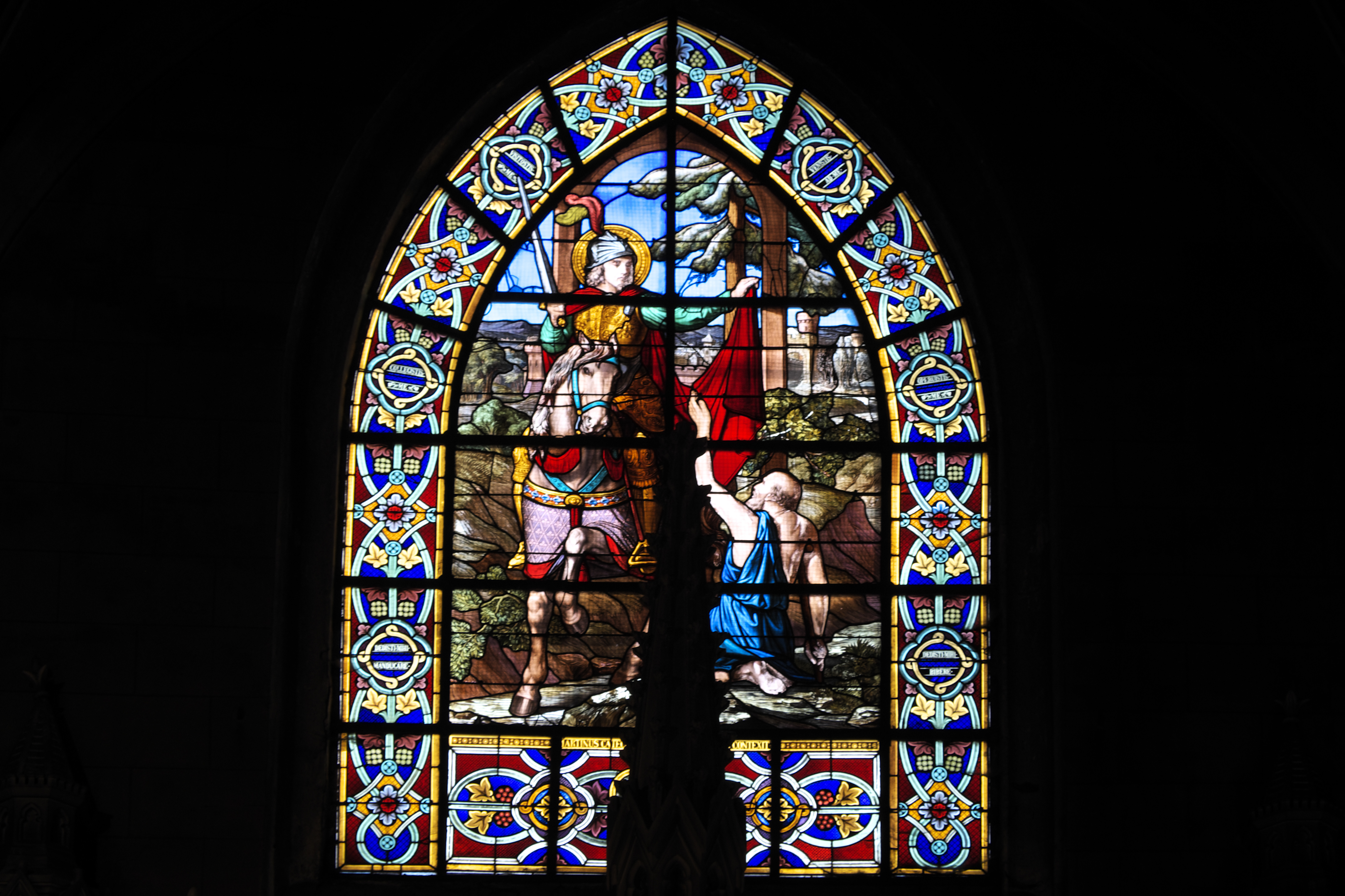 Katholische Pfarrkirche Saint-Martin in Longjumeau im Département Essonne (Île-de-France/Frankreich), Bleiglasfenster im Chor, Darstellung: Hl. Martin